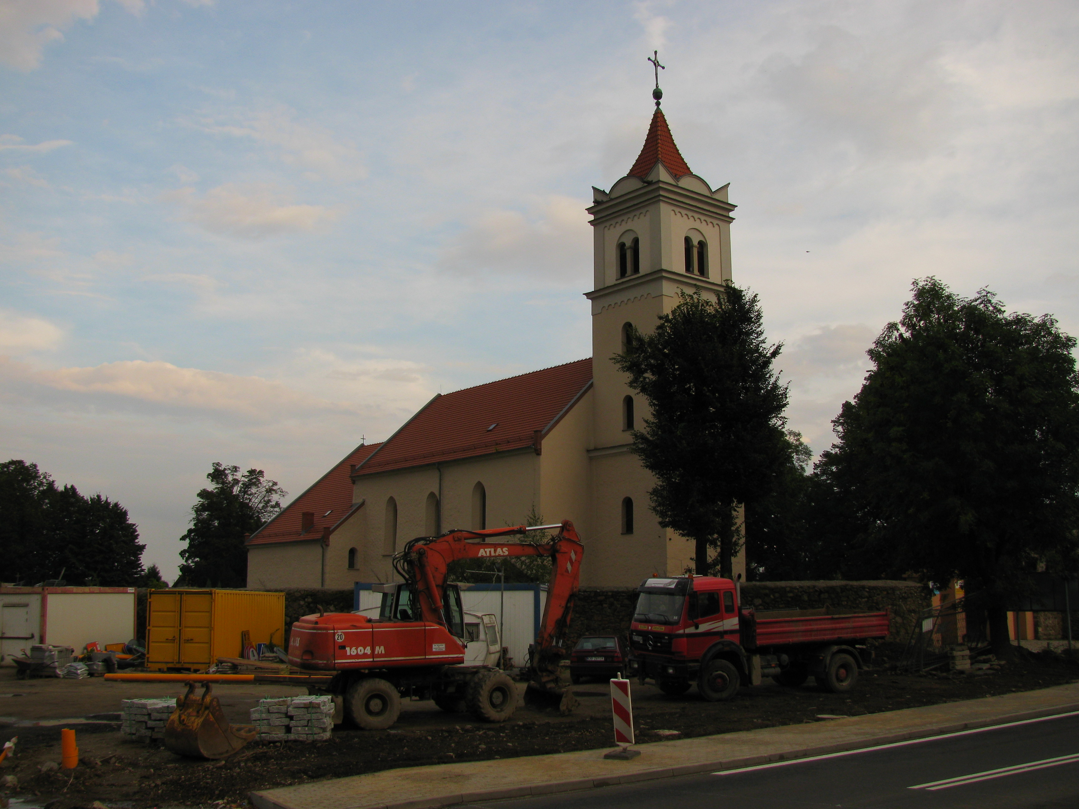 Świebodzice - Ciernie, kościół pom. p.w. św. Franciszka, XIV, 1891